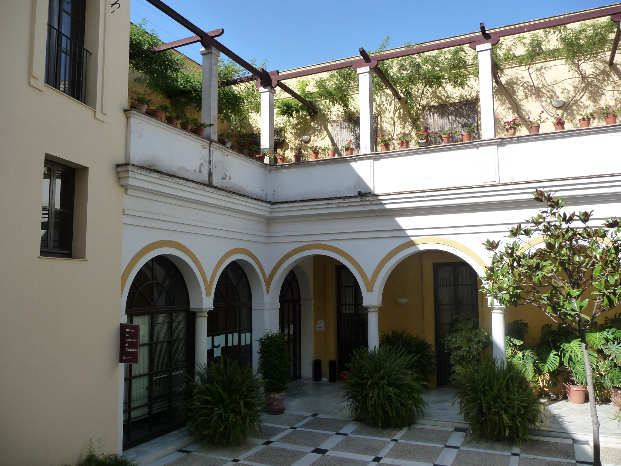 Ayuntamiento-JerezFra-p1040433.jpg